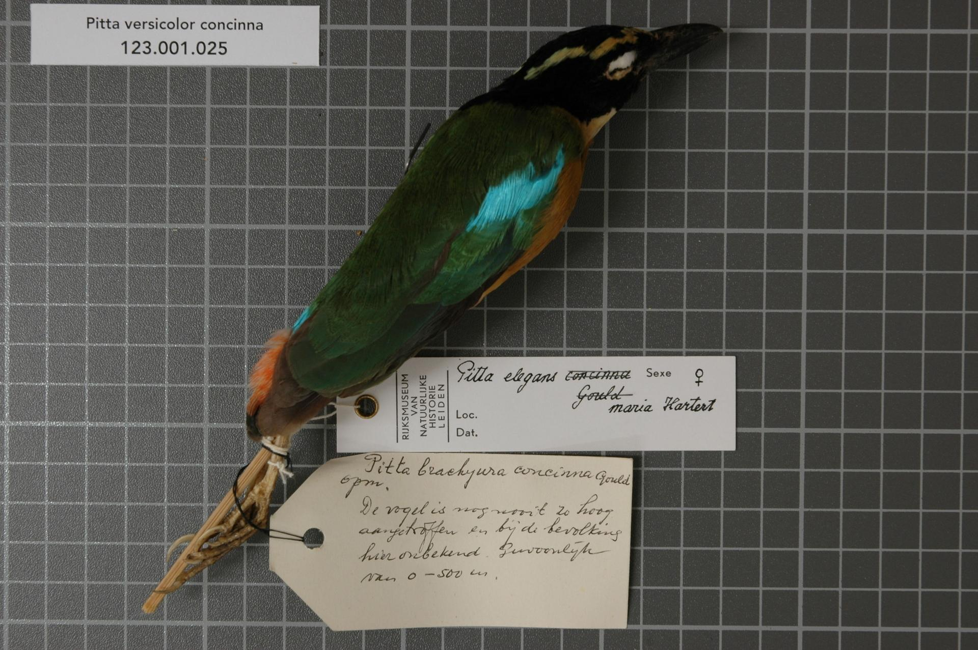 Pitta versicolor concinna Gould, 1857